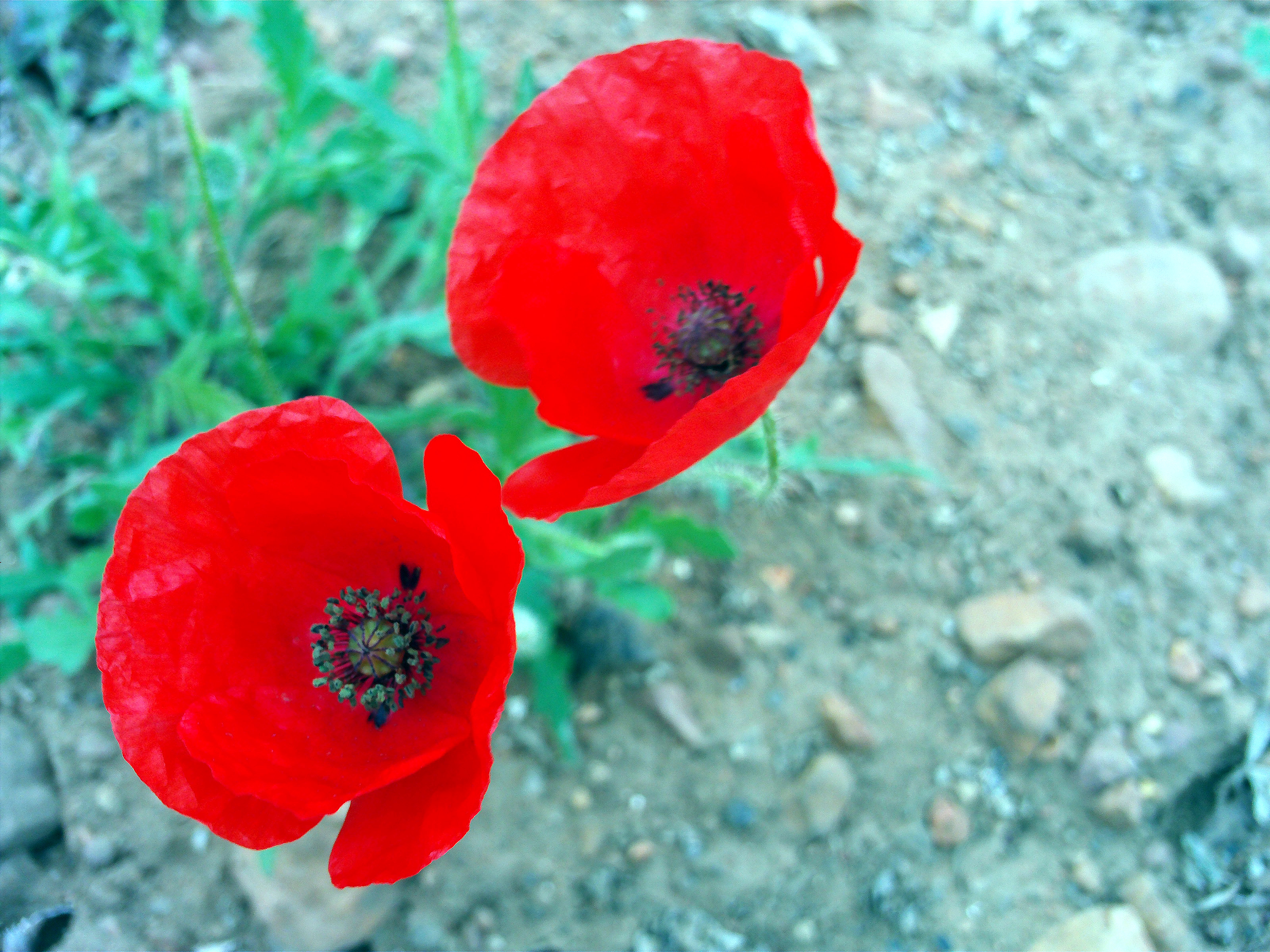 Papaver rhoeas Closeup Dehesa Boyal de Puertollano